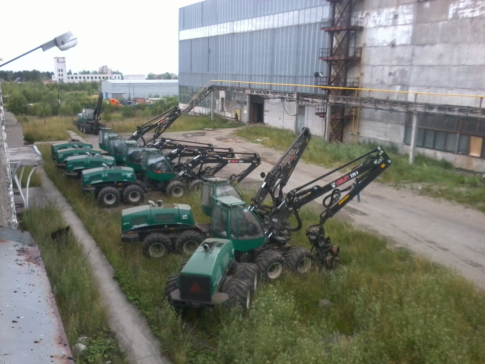 Харвестеры на ОТЗ